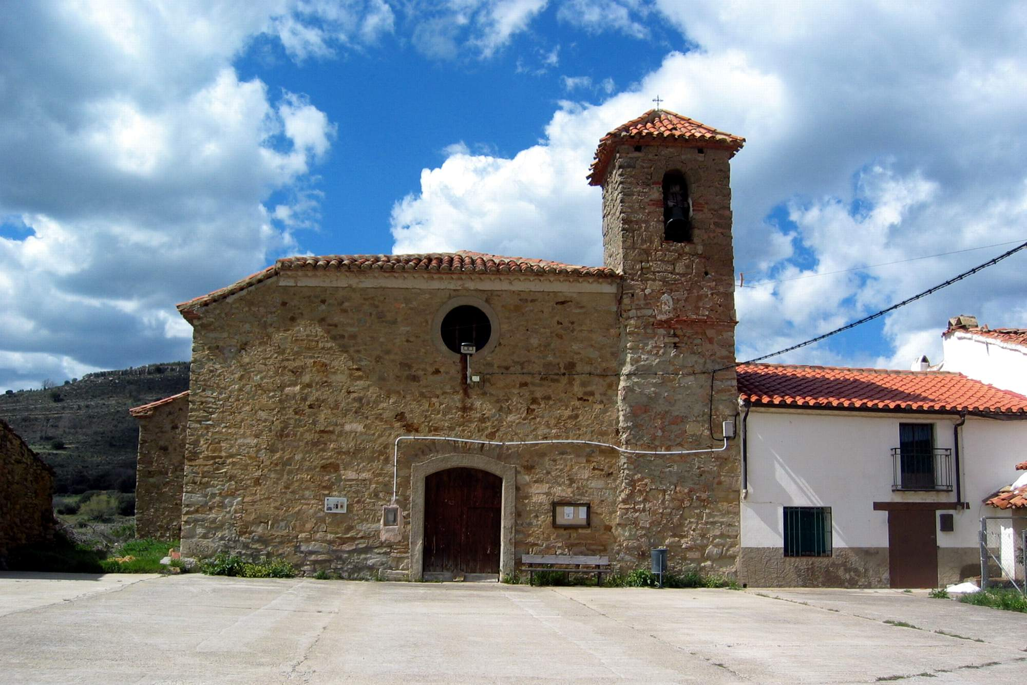 Vista frontal (meridional) de la iglesia parroquial de Arroyo Cerezo, Castielfabib (Valencia), año 2013.